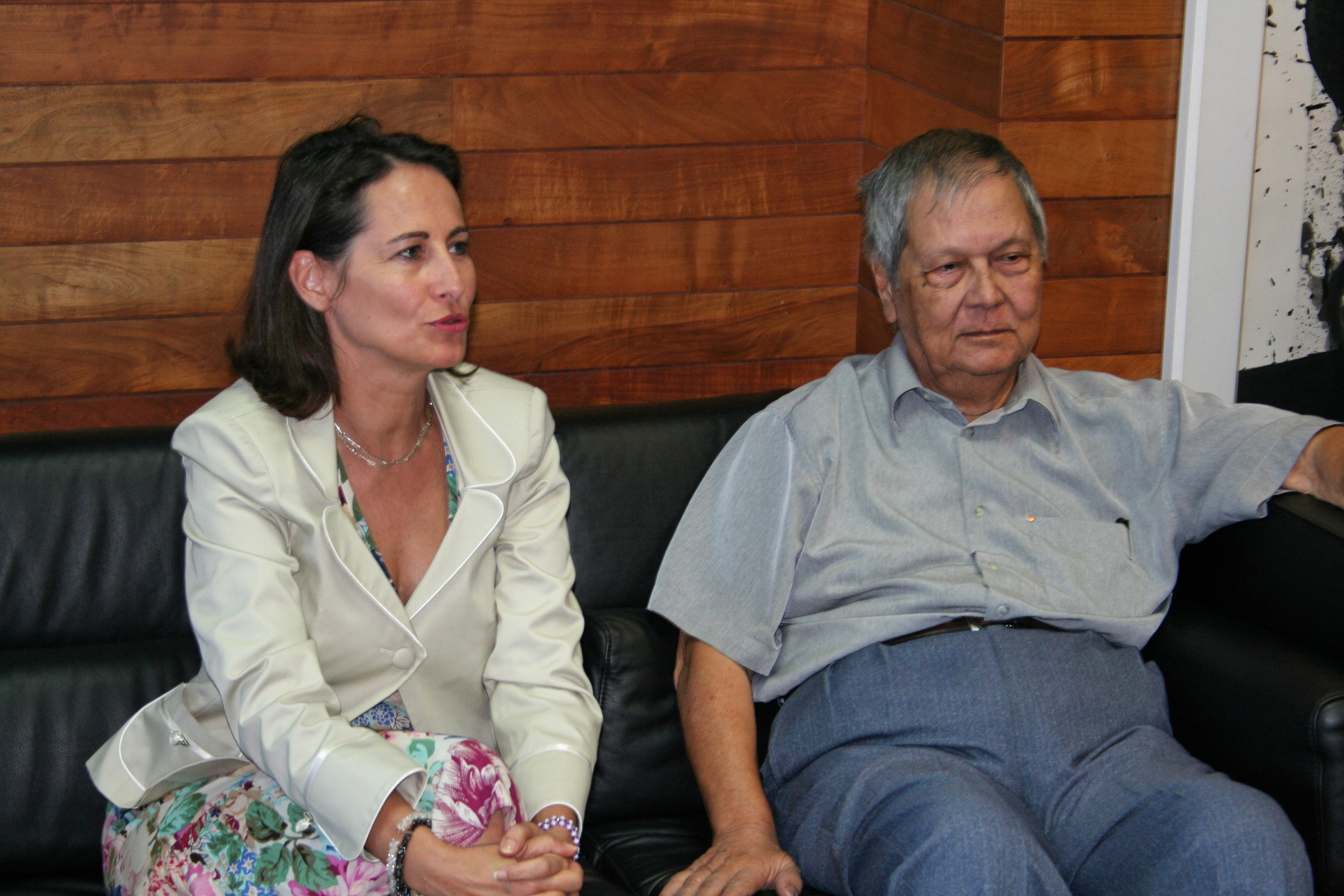 Ségolène Royal aux côtés de Paul Vergès lors d'un déplacement à La Réunion.